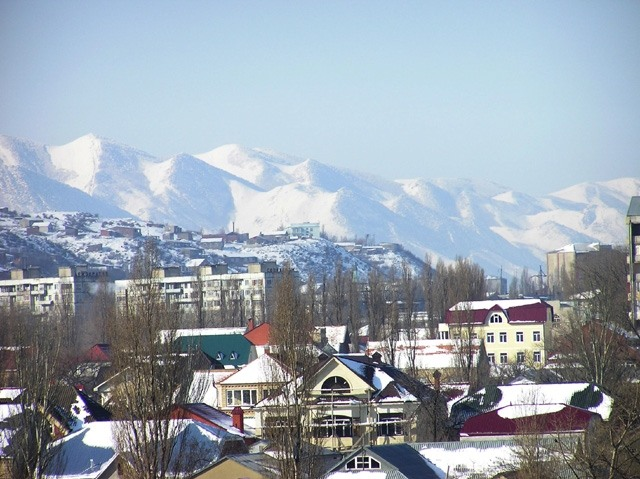 Буйнакск зимой